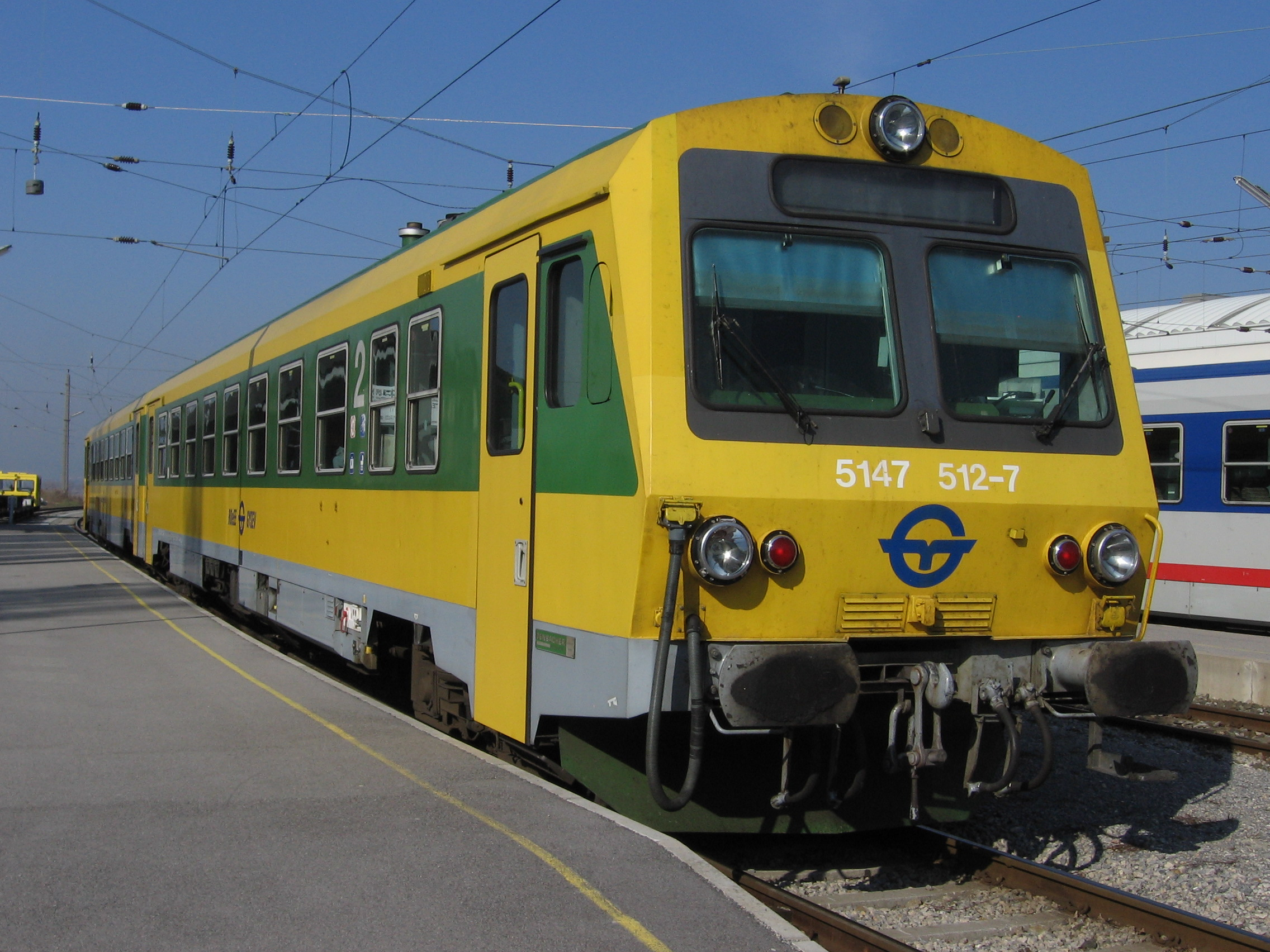 Raab-Ödenburg-Ebenfurter Eisenbahn.